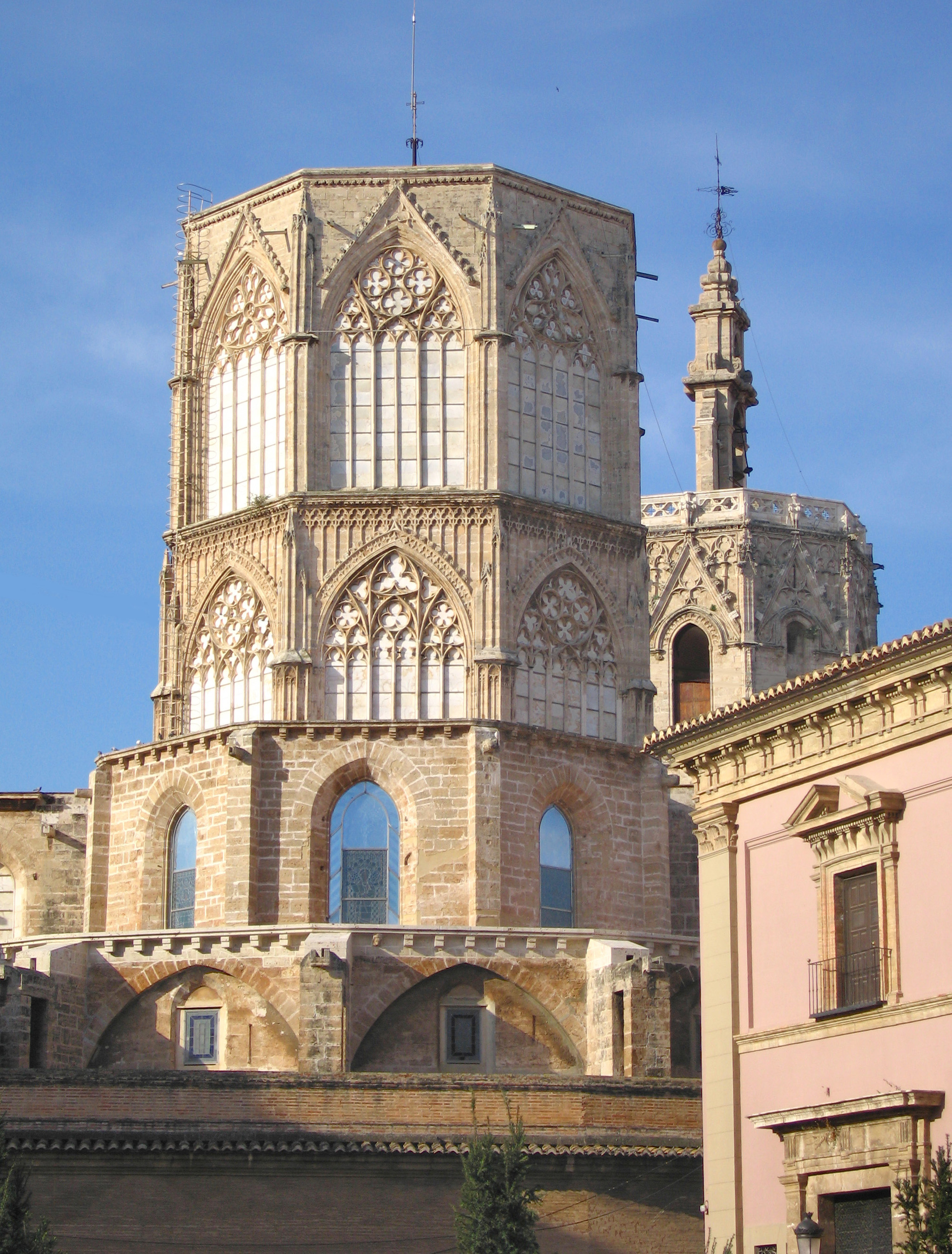 Cimbori de la Seu de València